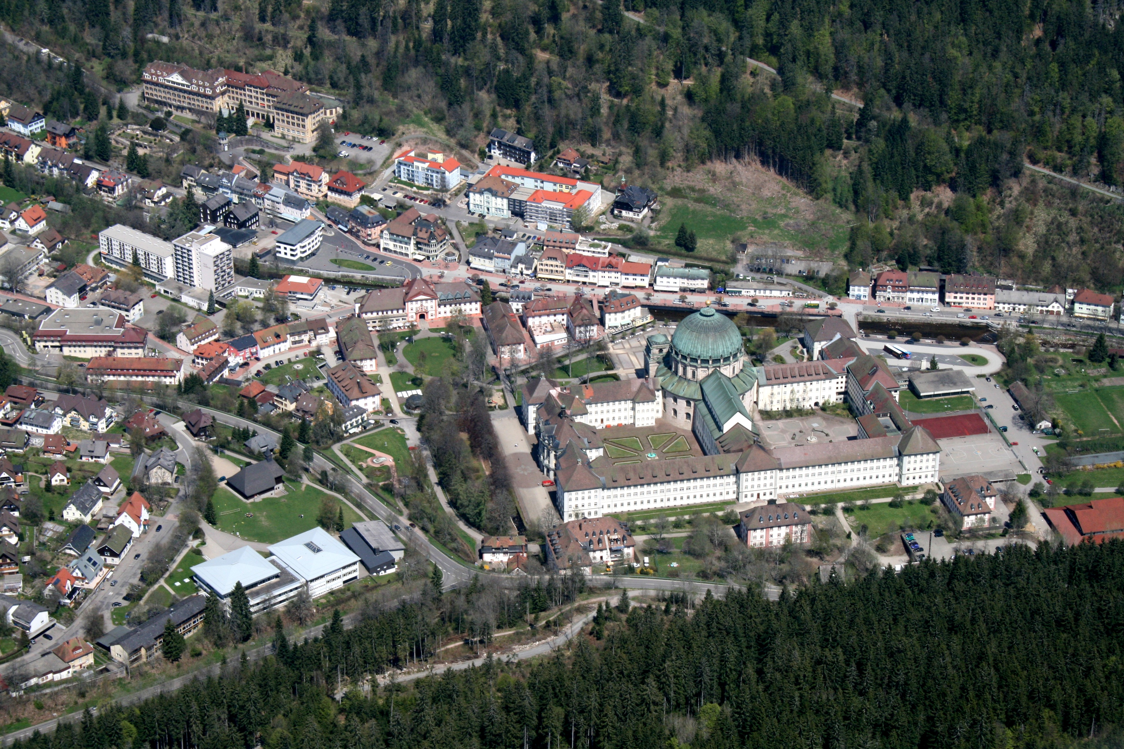 Der Dom St. Blasien aus der Luft gesehen